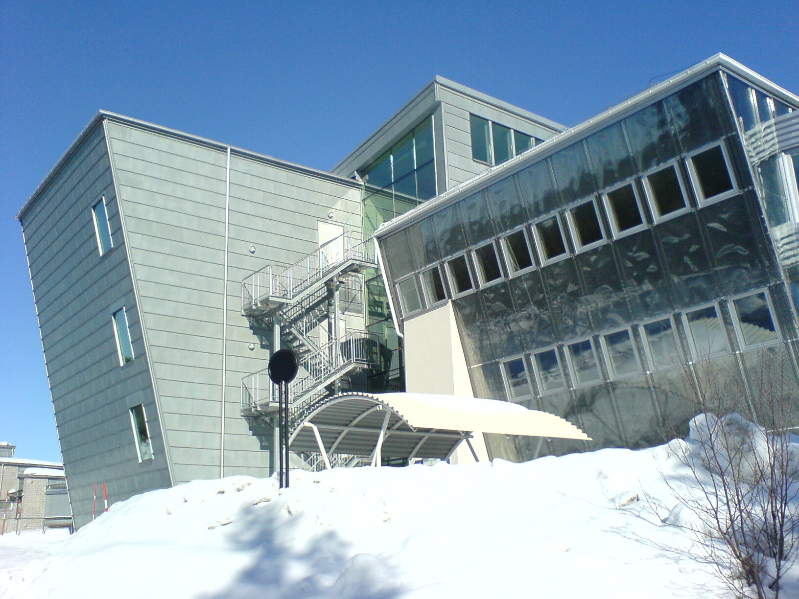 IRV:s entré. Foto made by Hans Weber